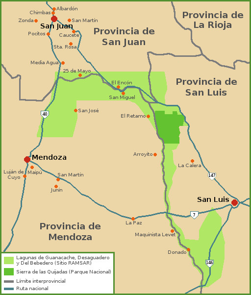 Esquema de ubicación de Lagunas de Guanacache, Desaguadero y Del Bebedero. Sitio Ramsar